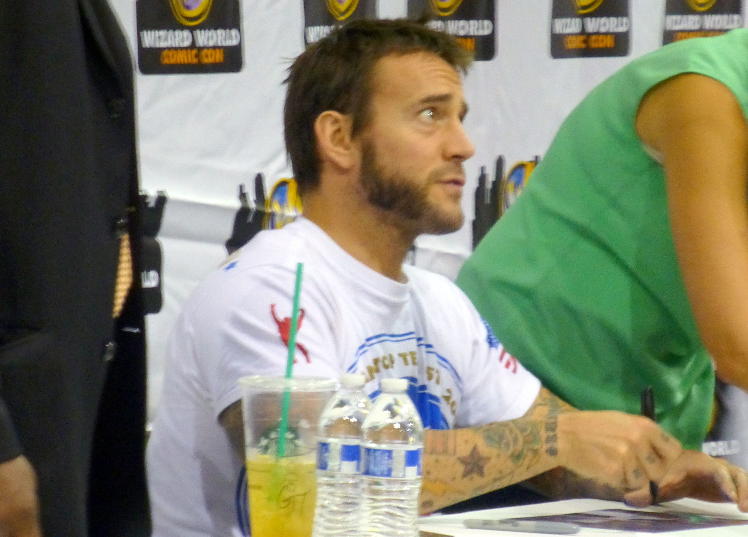 CM Punk 01